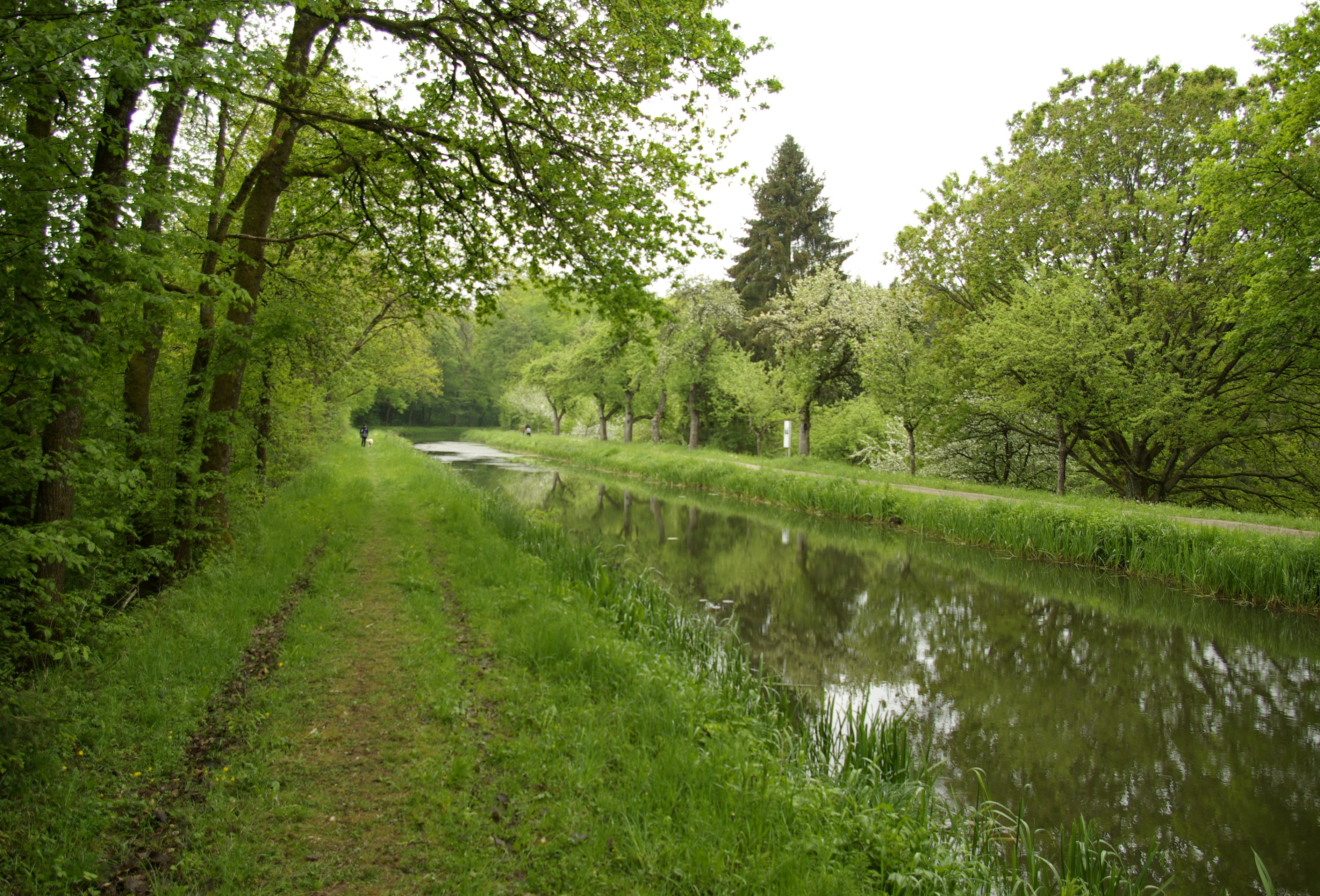 Der Distellochdamm des Ludwig-Donau-Main-Kanals. Der Damm gehört zu den aufwendigsten Bauwerken der 1836 bis 1846 errichteten und 1950 stillgelegten Wasserstraße. Rechts hinter den alten Obstbäumen reicht der Hang des künstlich aufgeschütteten Damms über 29 Meter in die Tiefe. Blick vom südlichen Ufer nach Westen.